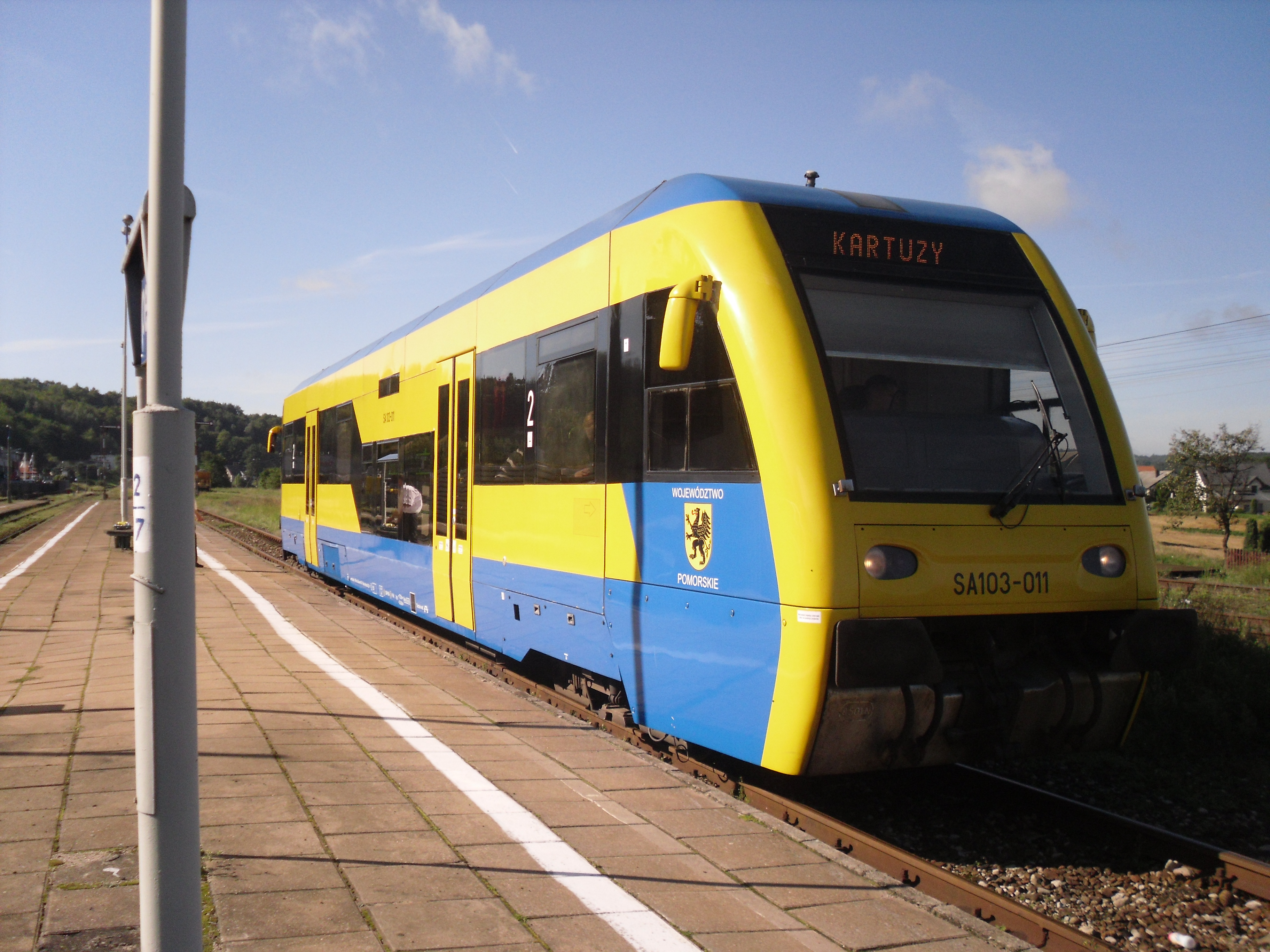 SA103 w pociągu relacji Gdynia Gł - Kartuzy na stacji Somonino